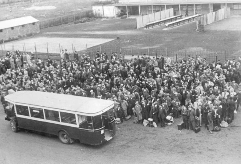 Im besetzten Gebiet. (Frankreich) Festnahme von Juden in Paris. - Die Festgenommenen im Sammellager. PK-Aufnahme: Kriegsberichter: Wisch (Sch) 82814-41 Aug. 41